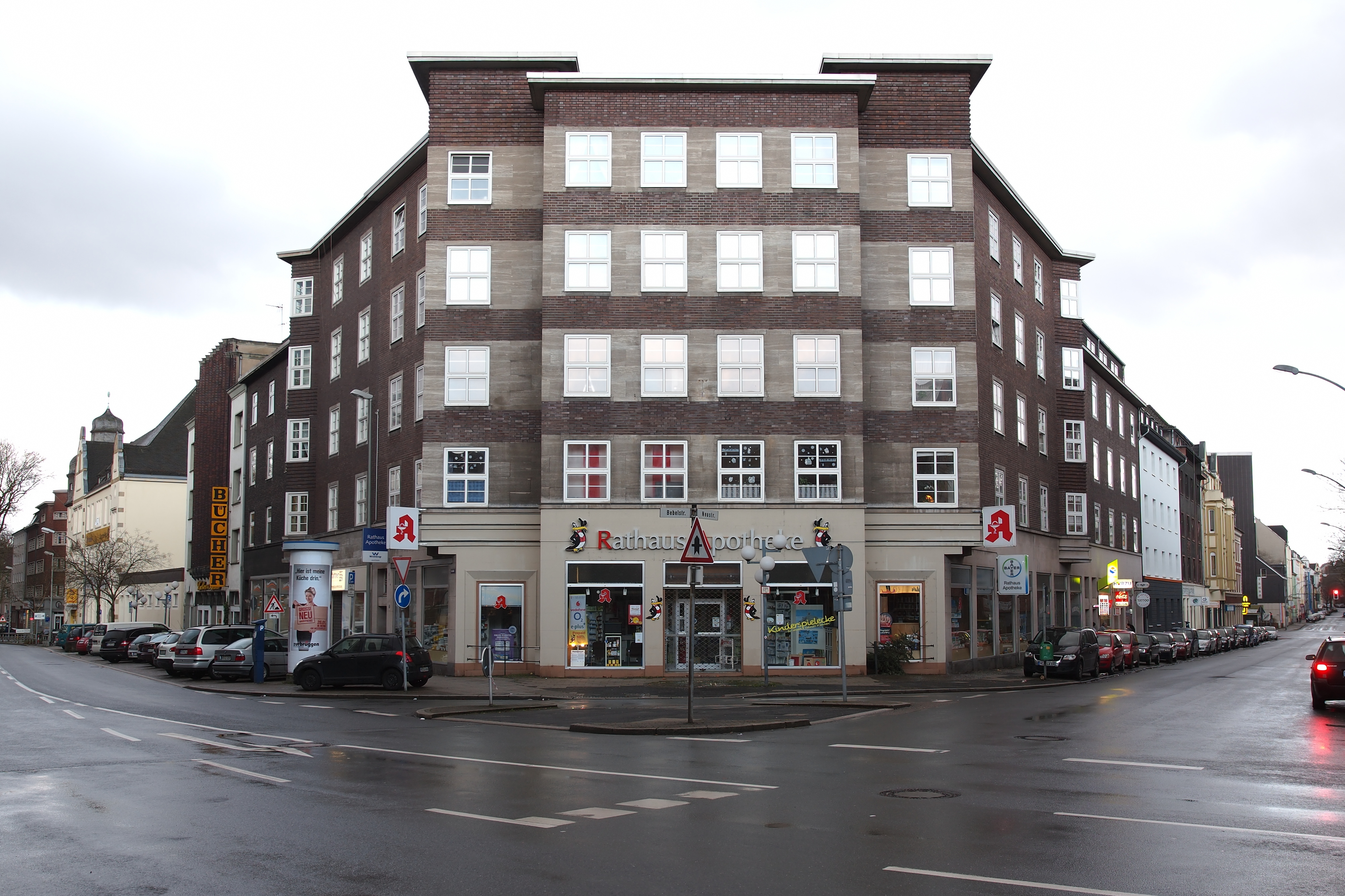 Eckgebäude Bebelstraße/Neustraße, Wohn- und Geschäftshaus, Denkmal in Herne-Mitte, Ansicht von E